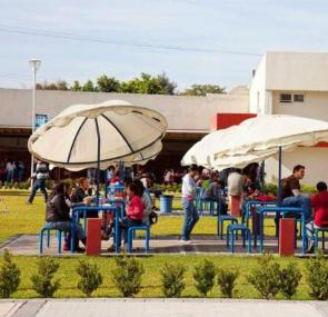 Terraza gourmet UTEG